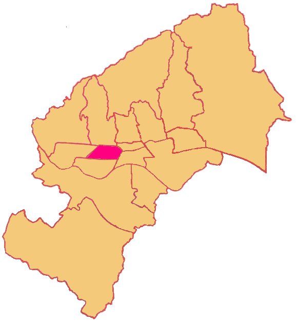 Map of Trešnjevka Sjever District in Zagreb (Gradska četvrt Trešnjevka Sjever)